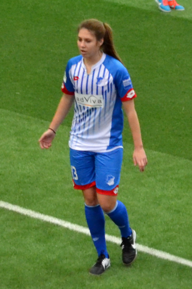 Isabella Hartig (TSG 1899 Hoffenheim) beim SAP Frauen-FußballCup 2016